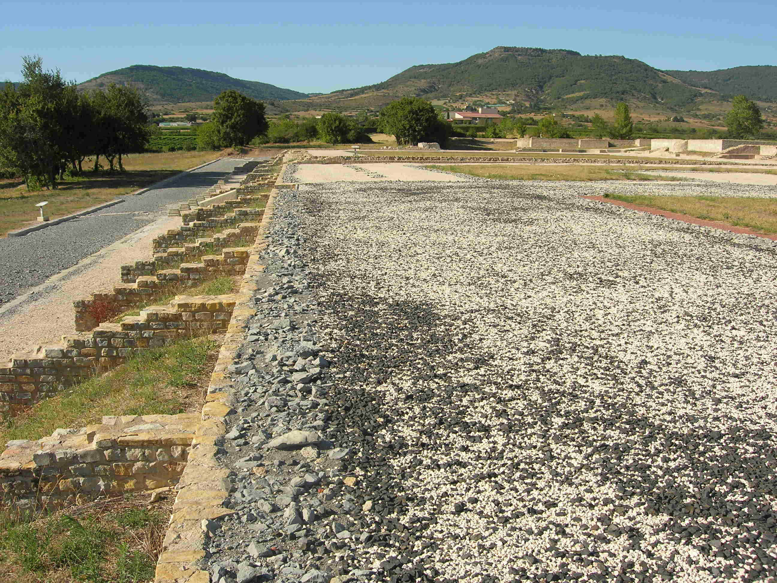 Site archéologique romain d'Alba-la-Romaine, Ardèche, France.